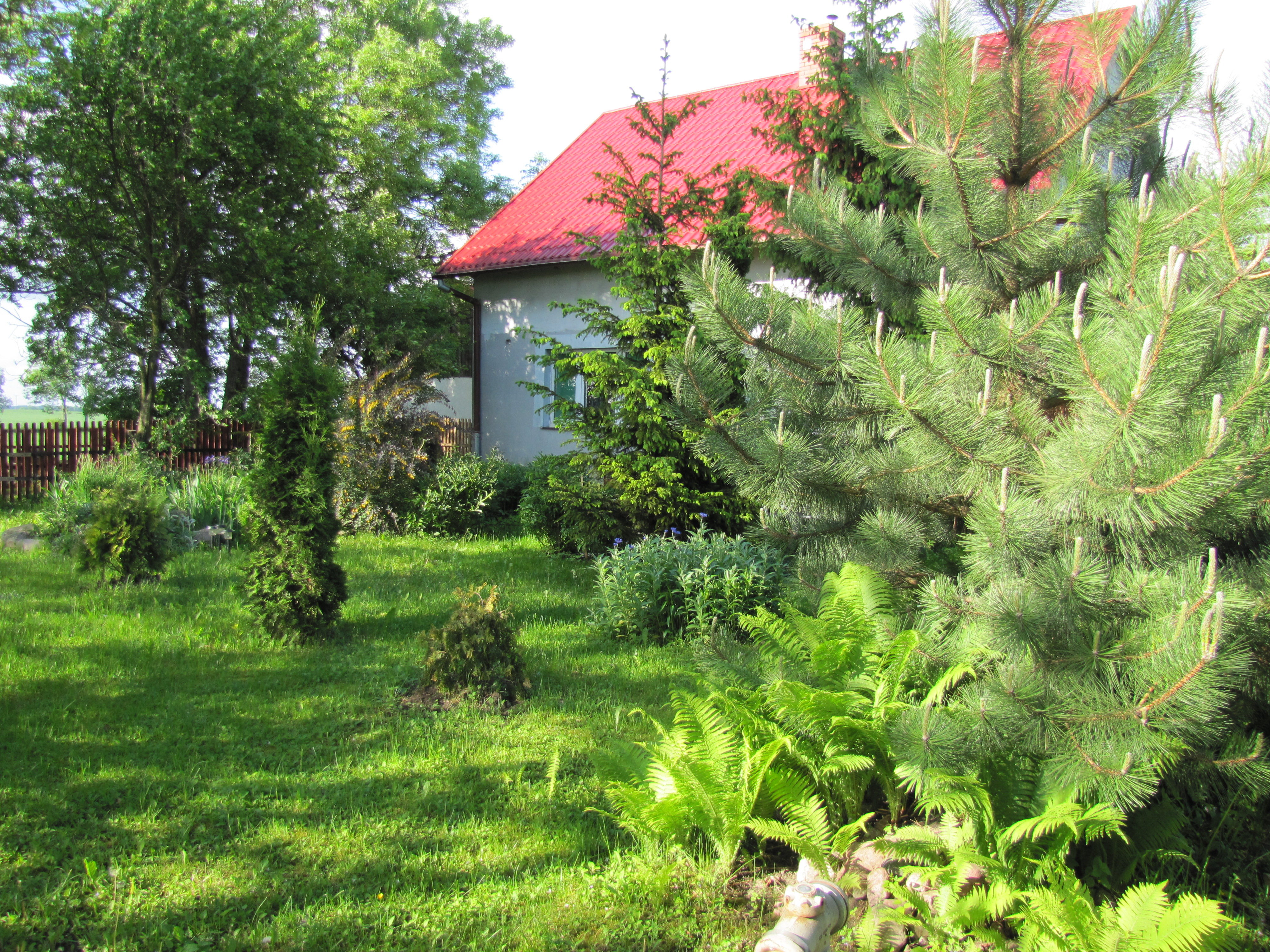 Dom w Niedziałach.